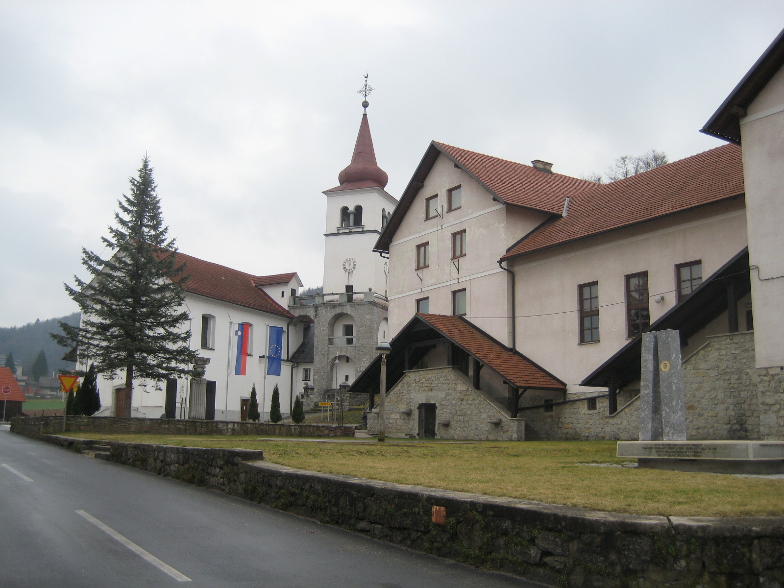 Mokronog, town in Slovenia